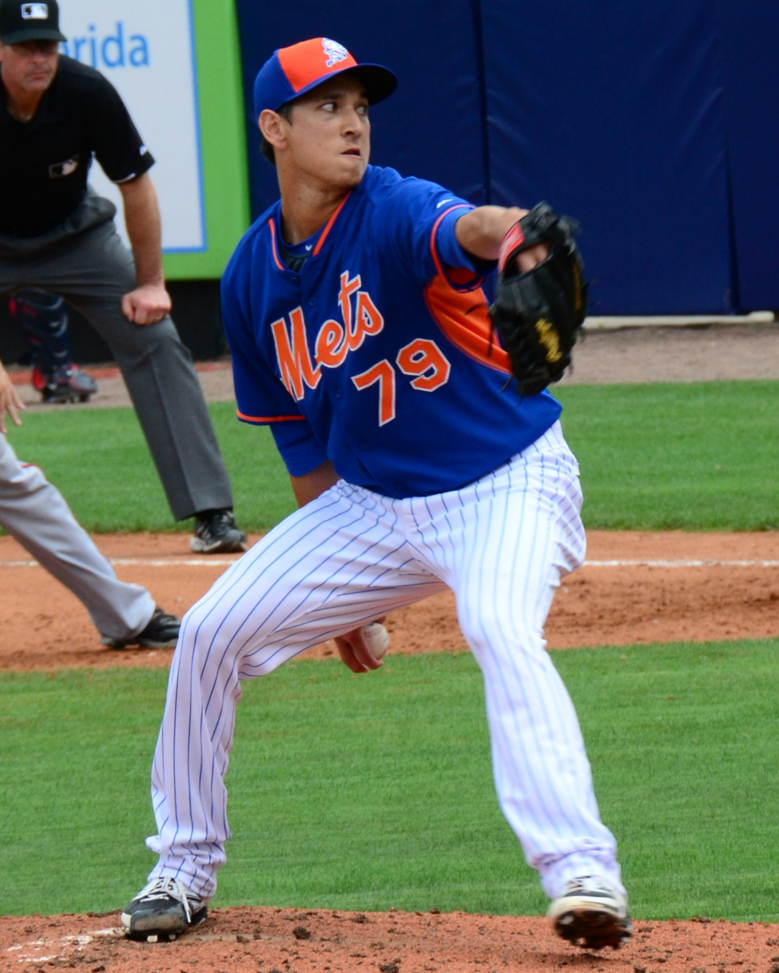 Matt Bowman